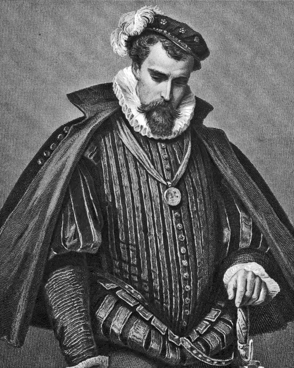 Leicester aus Friedrich Schillers Drama Maria Stuart, als Stahlstich gestochen um 1859 nach einer Zeichnung von Arthur von Ramberg